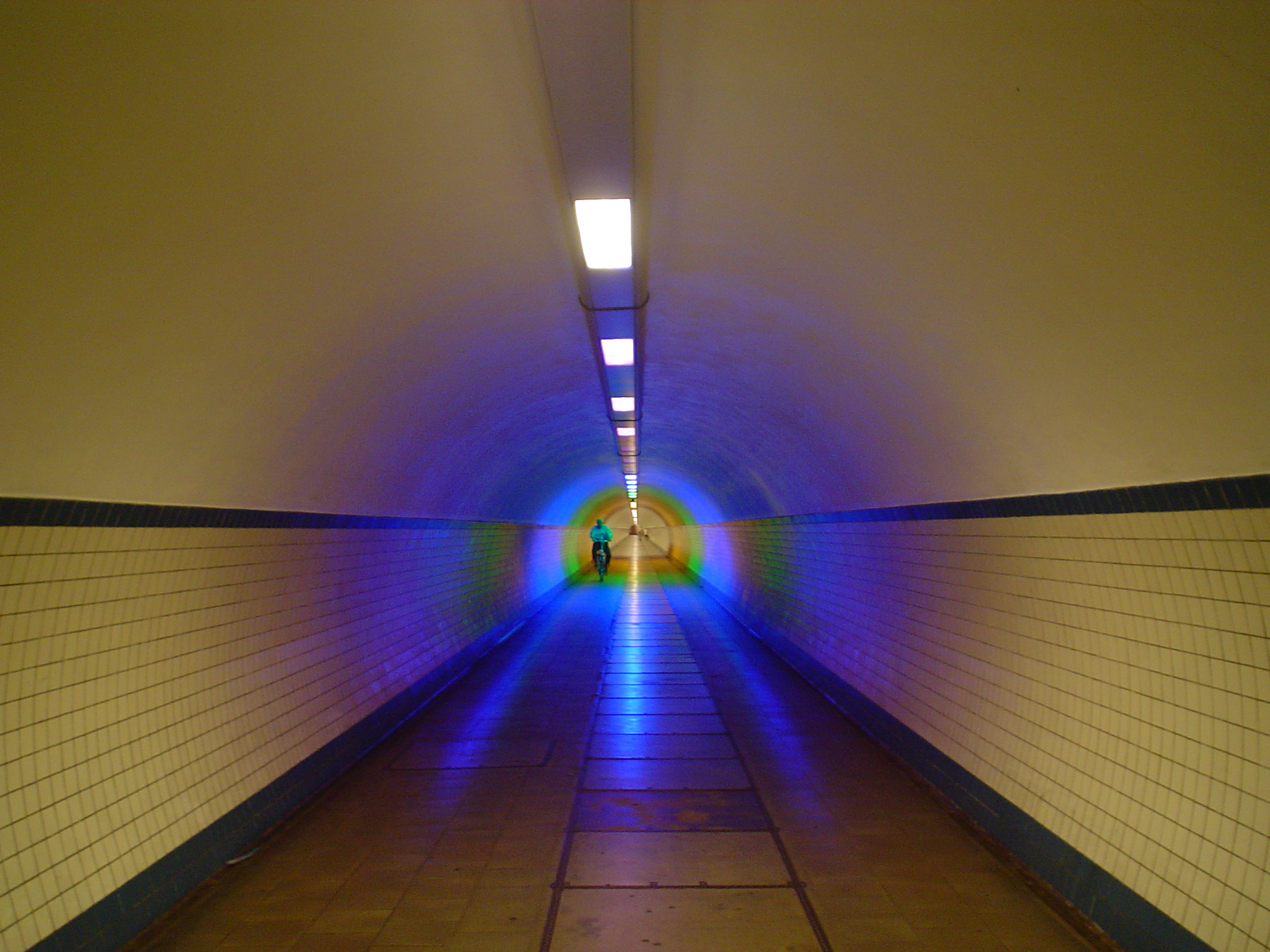 De voetgangerstunnel "Sint-Anna", verbinding met Linkeroever. Tunnelwerken uitgevoerd van 1931 tot 1933 naar het ontwerp van Frankignoul; de architectuur van de bovenbouwen werd verzorgd door E. Van Averbeke. Het Kleine Tunnelgebouw kwam op de plaats van de Waterpoort of Koninklijke poort, afkomstig van de Vlasmarkt, die uiteengenomen en in 1936 terug geplaatst werd op de Gillisplaats.